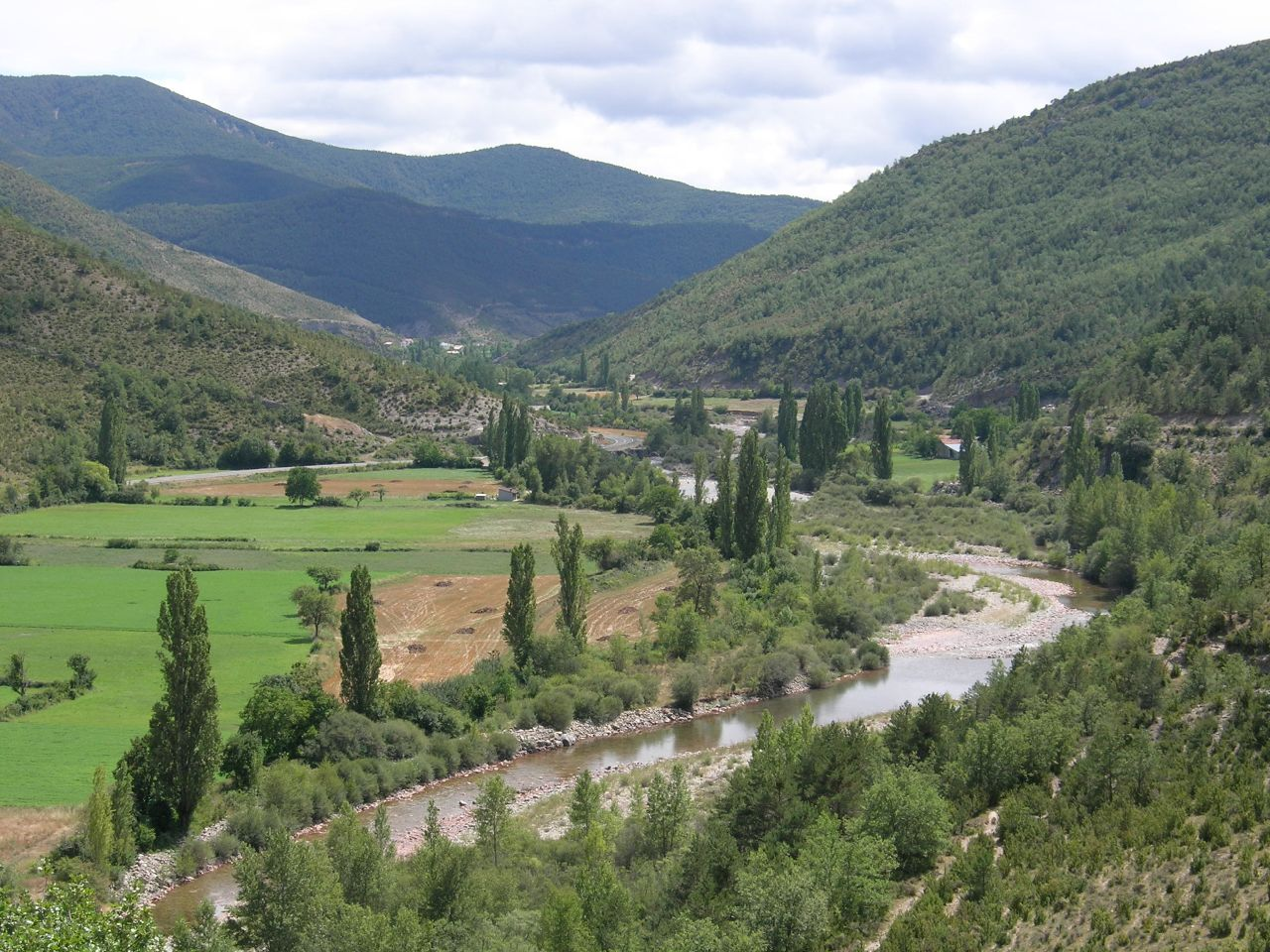 Aragonés: Río Aragón Subordán en a bal d'Echo (Uesca, Aragón).